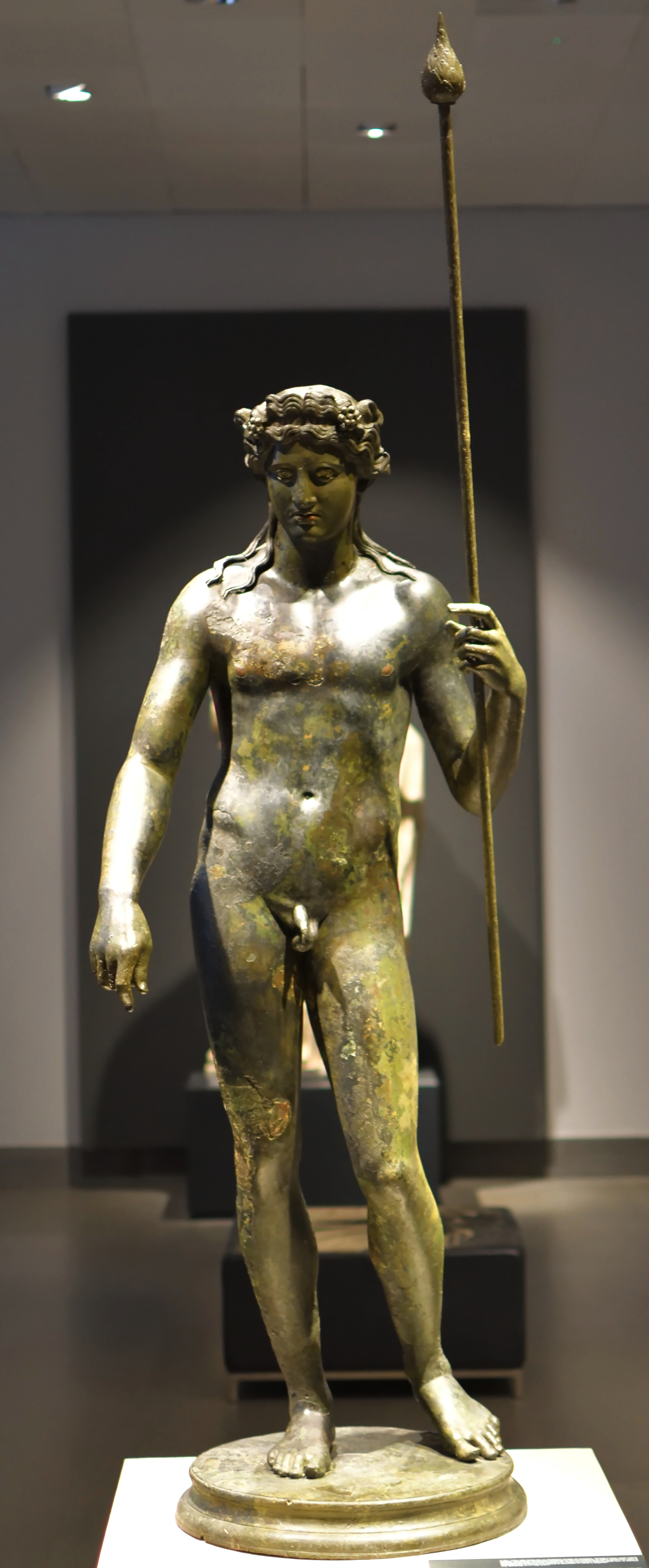 Römische Statue des Dionysos, hergestellt zwischen 117 - 138 n. Chr.; ausgestellt im Museo Nazionale Romano, Palazzo Massimo Alle Terme. Die Skulptur wurde mit dem Wachsausschmelzverfahren hergestellt. Diese zeigt den nackten jugendlichen Gott des Weines mit einem Thyrsos in der linken Hand. Das Haupt ist mit einem Diadem aus Rebensprossen gekrönt.